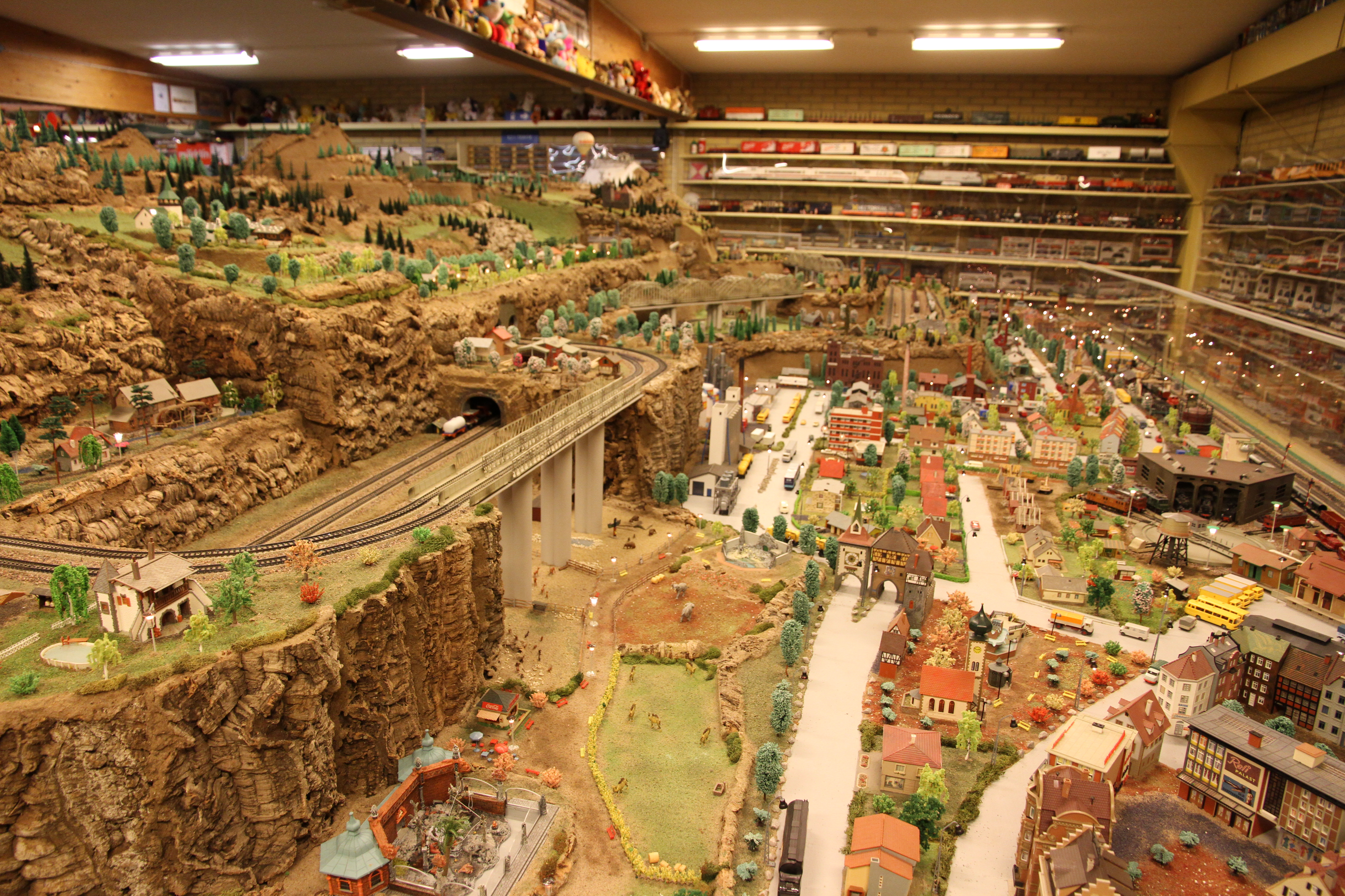 Eslövs Leksaksmuseum, Eslöv 22 juli 2015